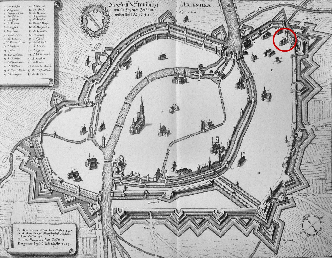 Localisation de l'église Sainte-Aurélie sur un plan de Strasbourg (Merian, 1643). Attention : orientation sud-nord.